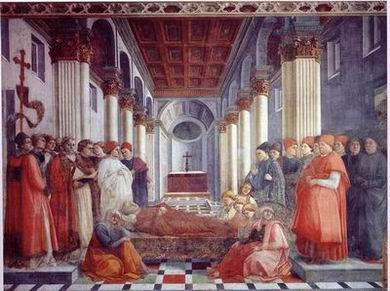 Filippo Lippi, Esequie di santo stefano, frescos in the cathedral of Prato.